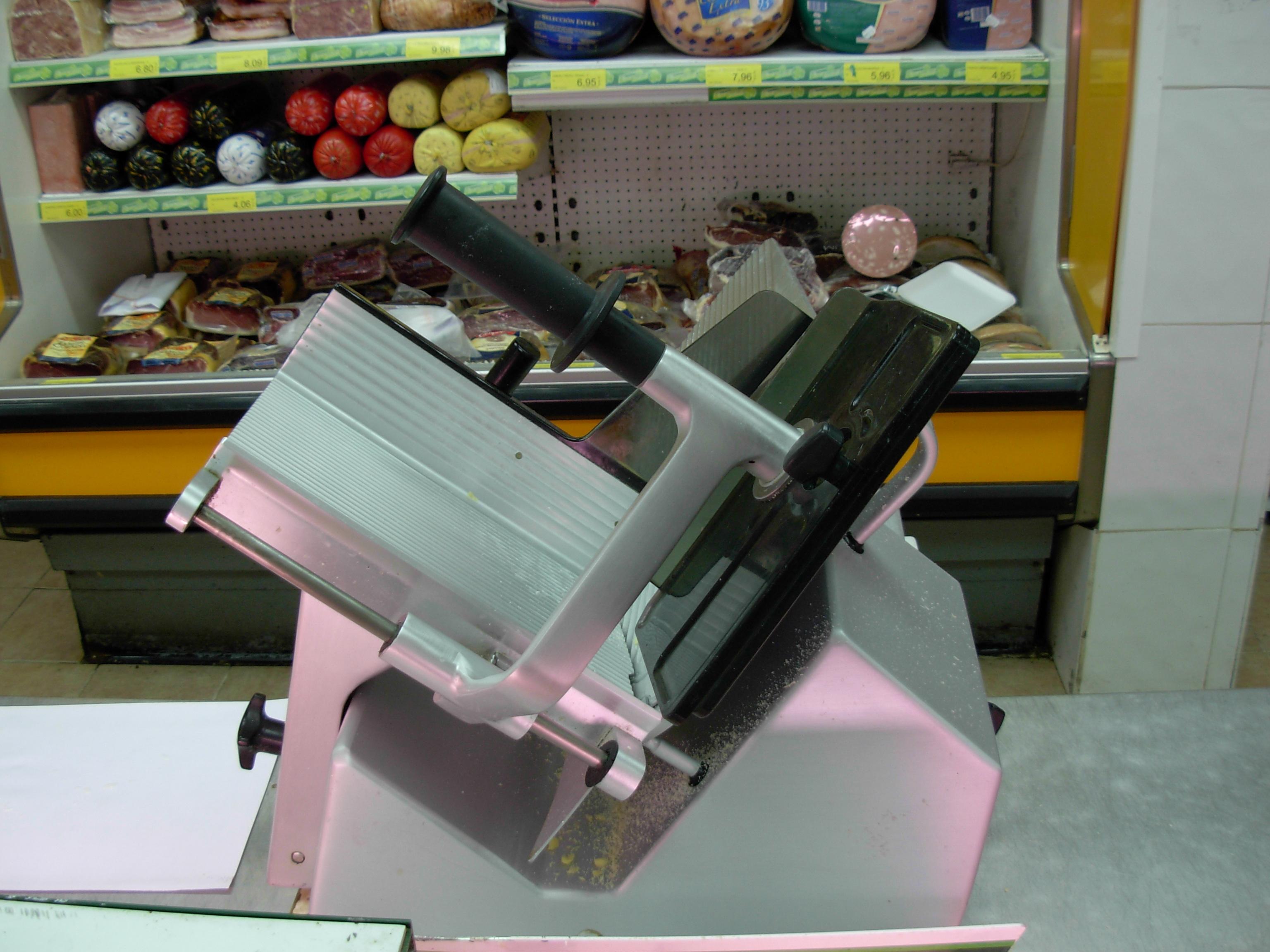 Aufschnittmaschine mit schräg gestelltem Schlitten.